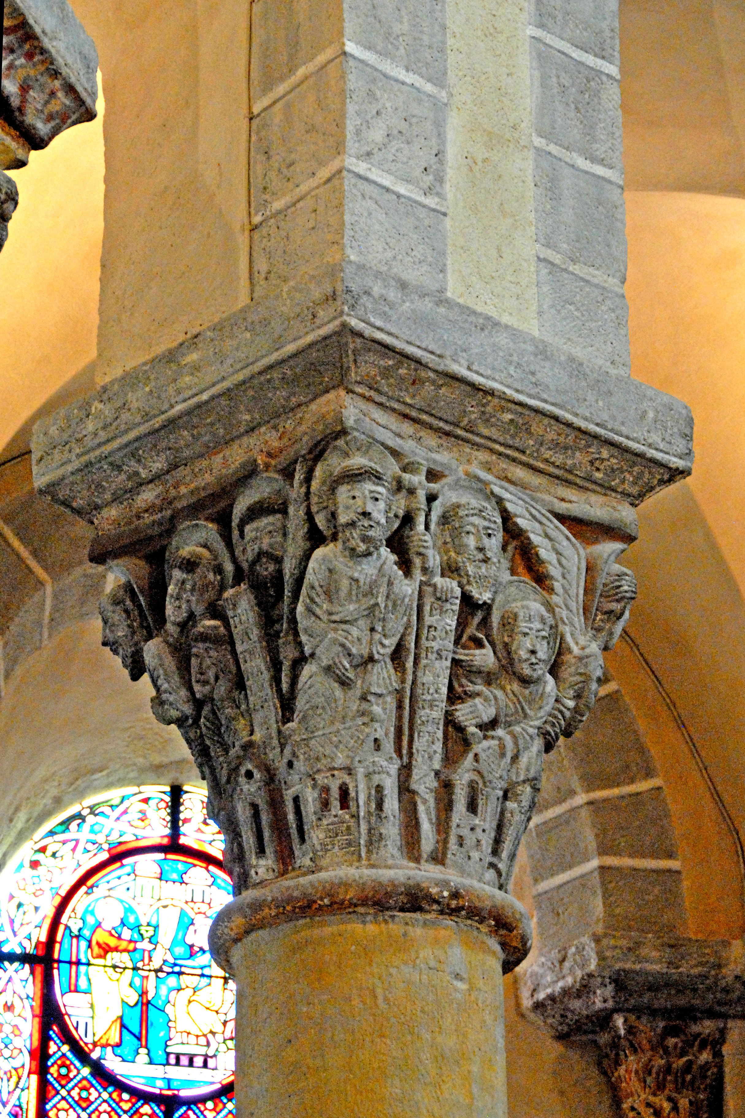 St.-Nectaire, Chorkapitell C, Seiten 9+10